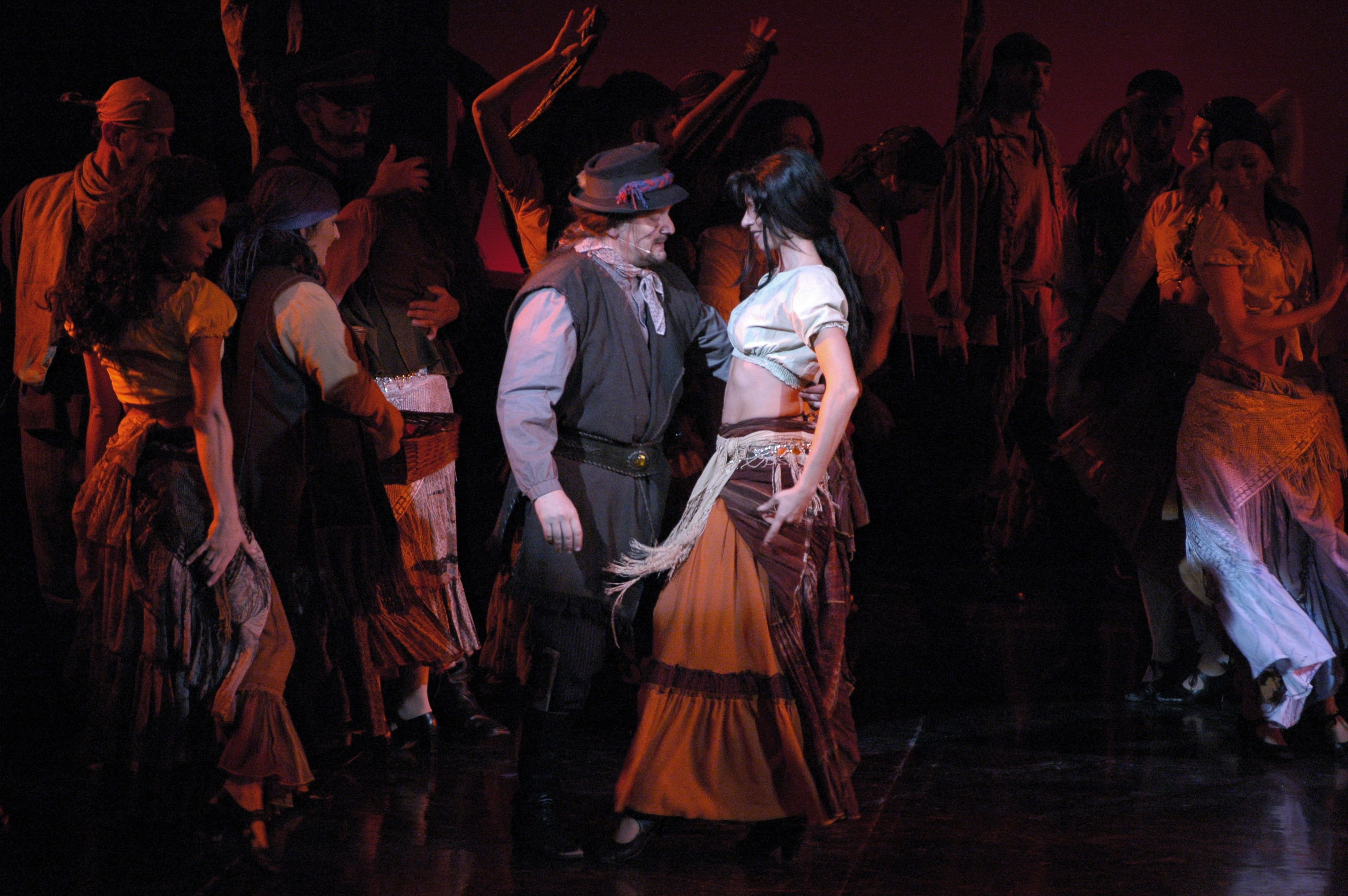 Predstava "Cigani lete u nebo"